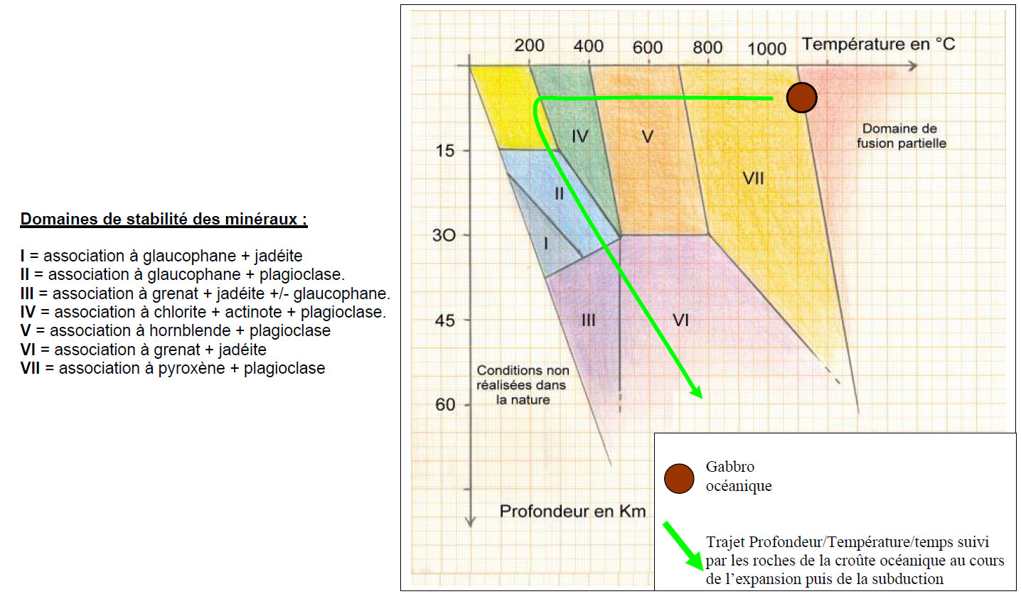 Domaines de stabilité des minéraux constituant les gabbros de la lithosphère océanique plongeante lors de l'expansion océanique puis de la subduction.